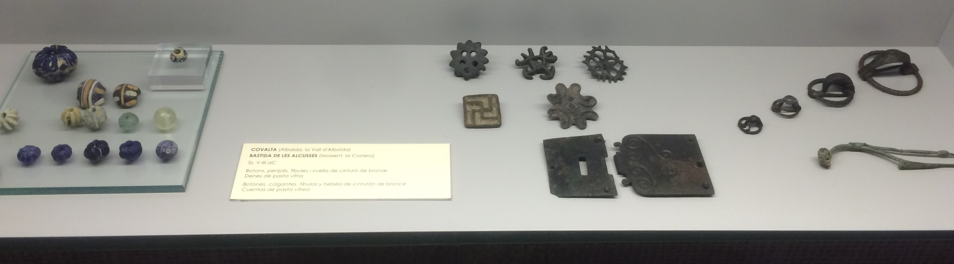 Vitrina del Museu de Prehistoria de Valencia con materiales procedentes de La Covalta